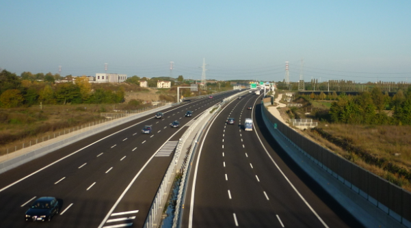 A4-PASSANTE DI MESTRE